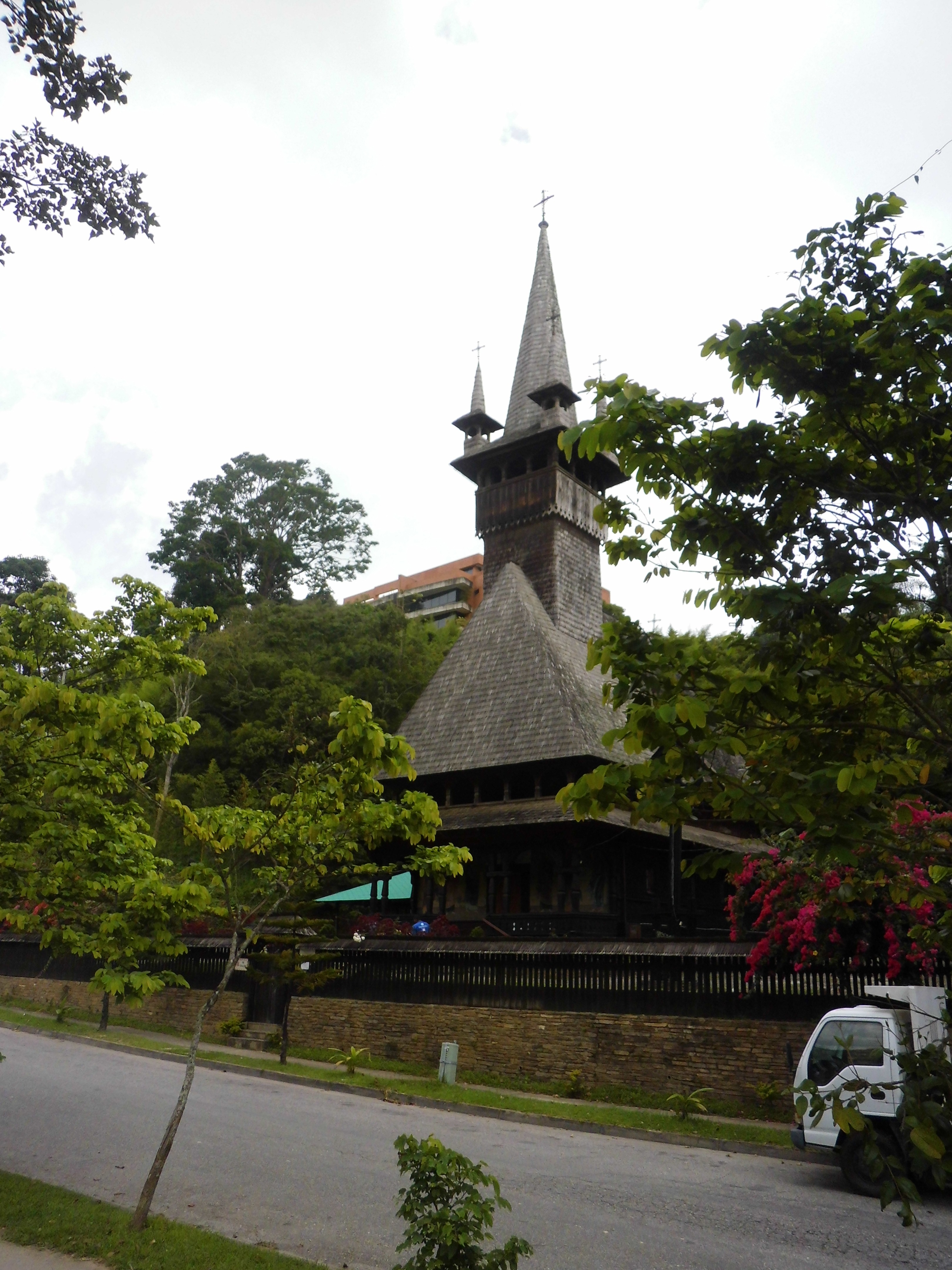 Iglesia San Constantino y Eanta Elena en avenida Sur de La Lagunita, municipio El Hatillo, estado Miranda - Venezuela.